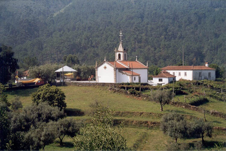 Igreja da freguesia de Amonde DescriÃ§Ã£o Igreja de Amonde Fonte Paulo Afonso LicenÃ§a Uso publico